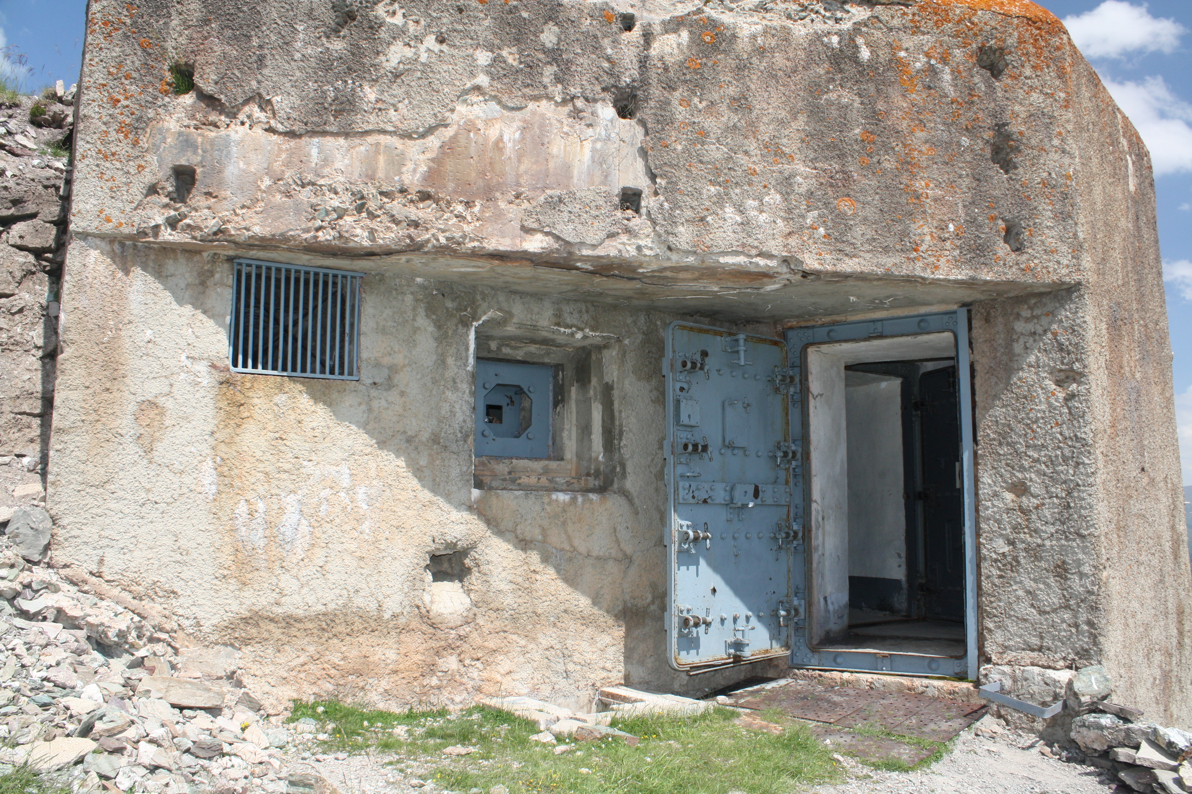 Entrée du bloc 1